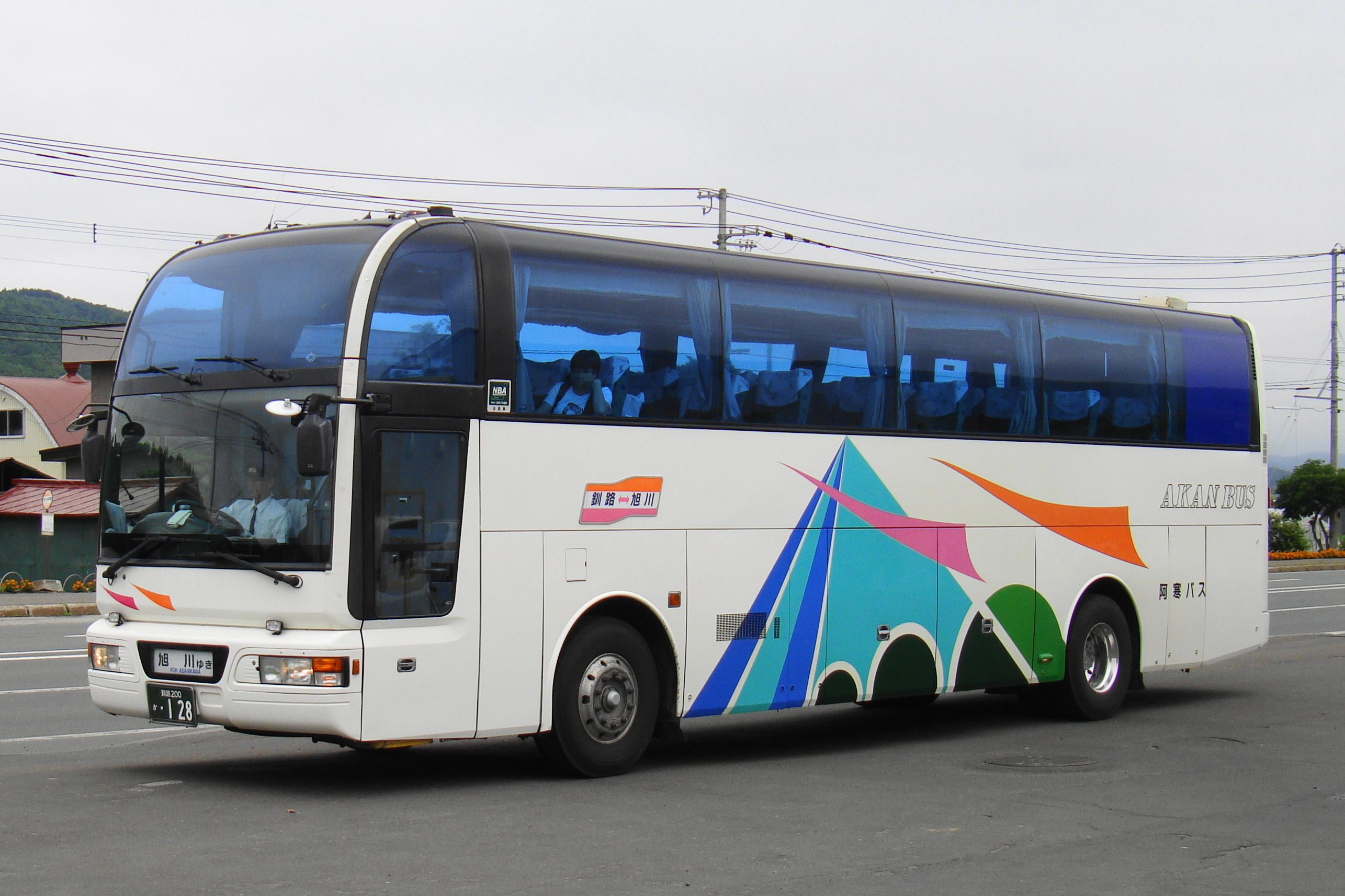 "Sunlise Asahikawa Kushiro gō" Kushuro to Asahikawa